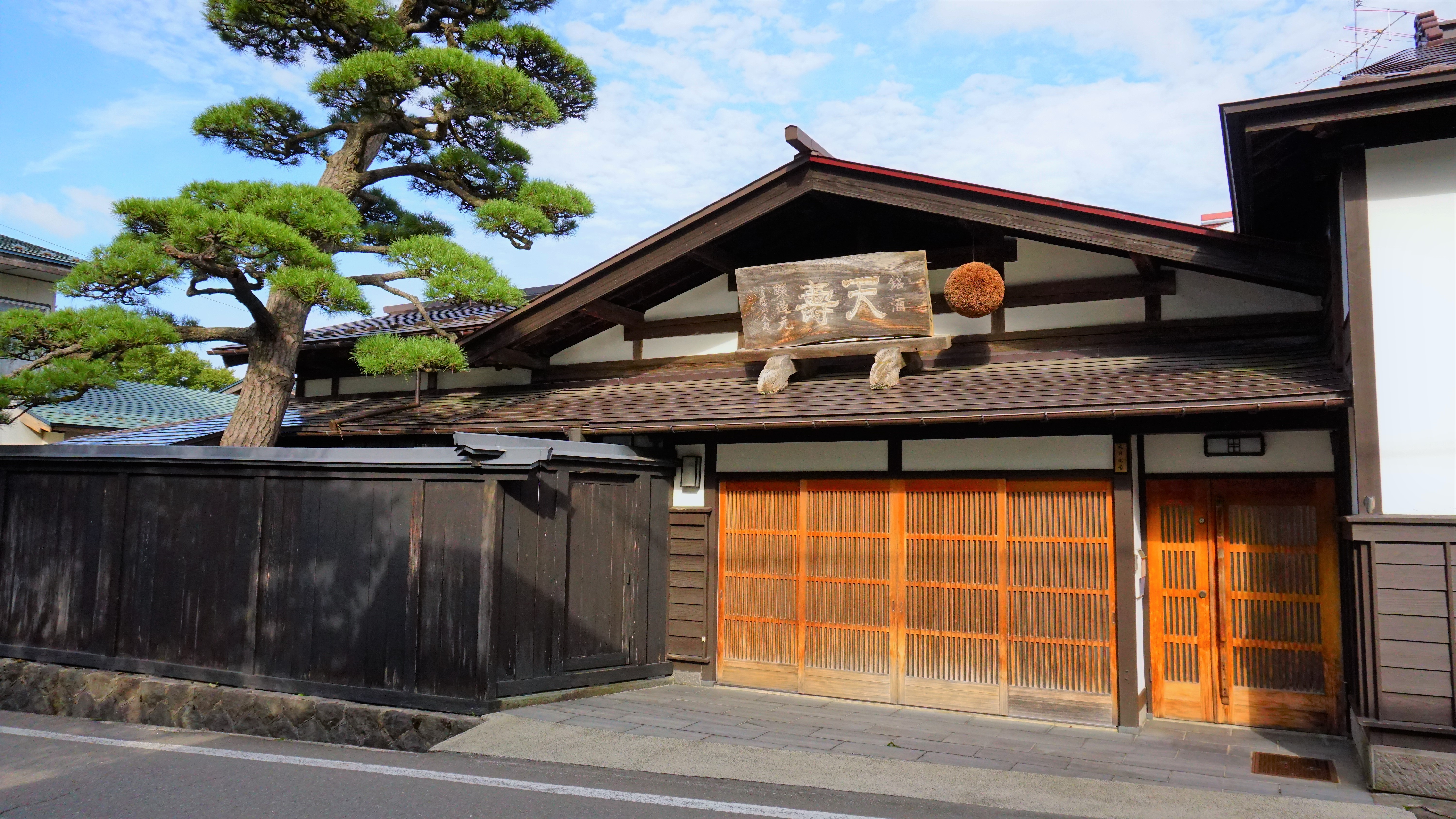 天寿酒造（秋田県由利本荘市矢島町）